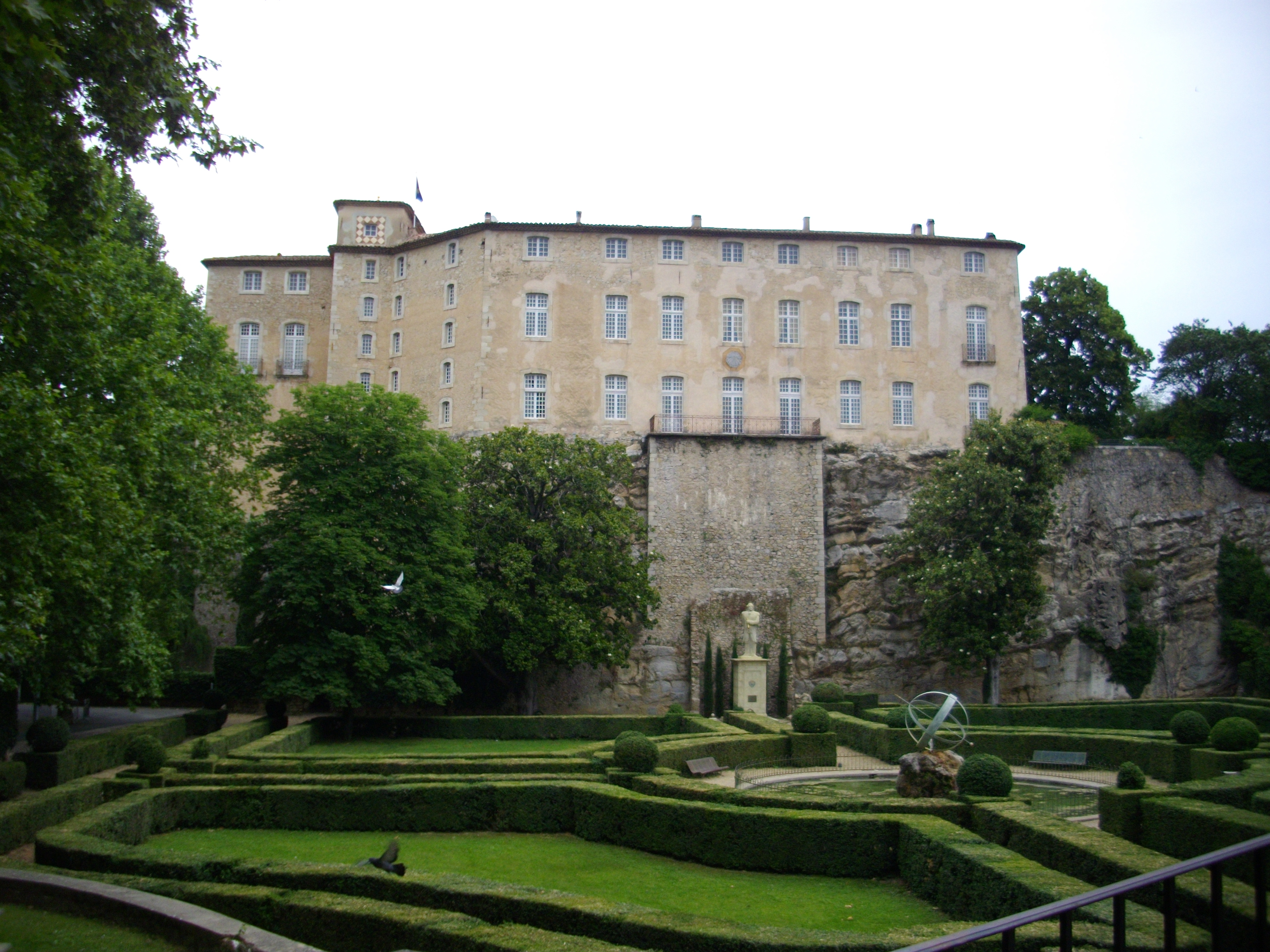 Le Château : Ancienne forteresse du XIe siècle, édifice remanié au cours des XVe, XVIe et XVIIIe siècles et contreforts, salle d'armes, de garde du XIe siècle. Ont été inscrits sur l'inventaire supplémentaire des monuments historiques par arrêté du 6 juillet 1988 : les façades et toitures ; les terrasses, y compris les murs de soutènement ; les rampes d' accès ; l' ancienne porterie ; la glacière ; les portails ; l' ensemble des ferronneries extérieures ; les trois salons, y compris leurs cheminées ; le grand escalier intérieur. Le site avait préalablement été classé par arrêté du 05 octobre 1955.